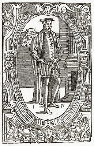 John Heywood (ca. 1497 - ca. 1580); Holzschnitt, Portrait in "The Spider and the Fly" (16. Jahrhundert)